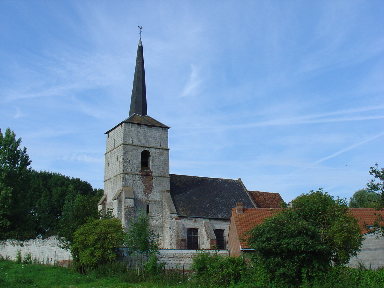 L'église d'Agnières